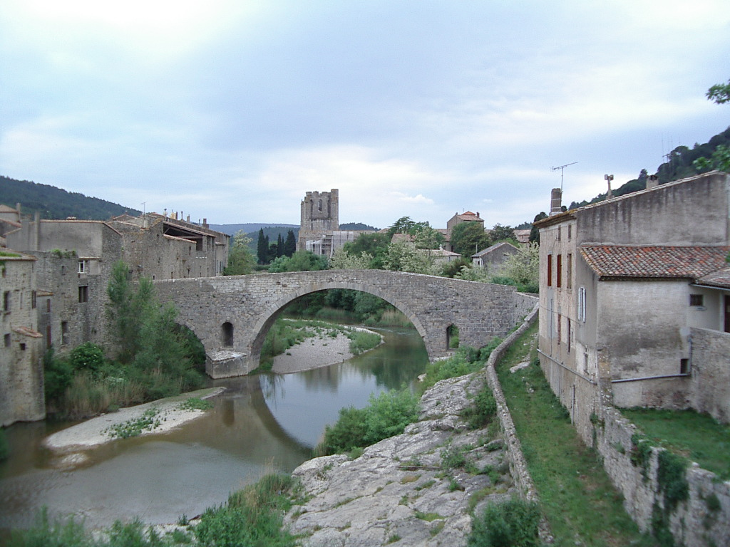 Abadia de La Grassa i Pont Vell